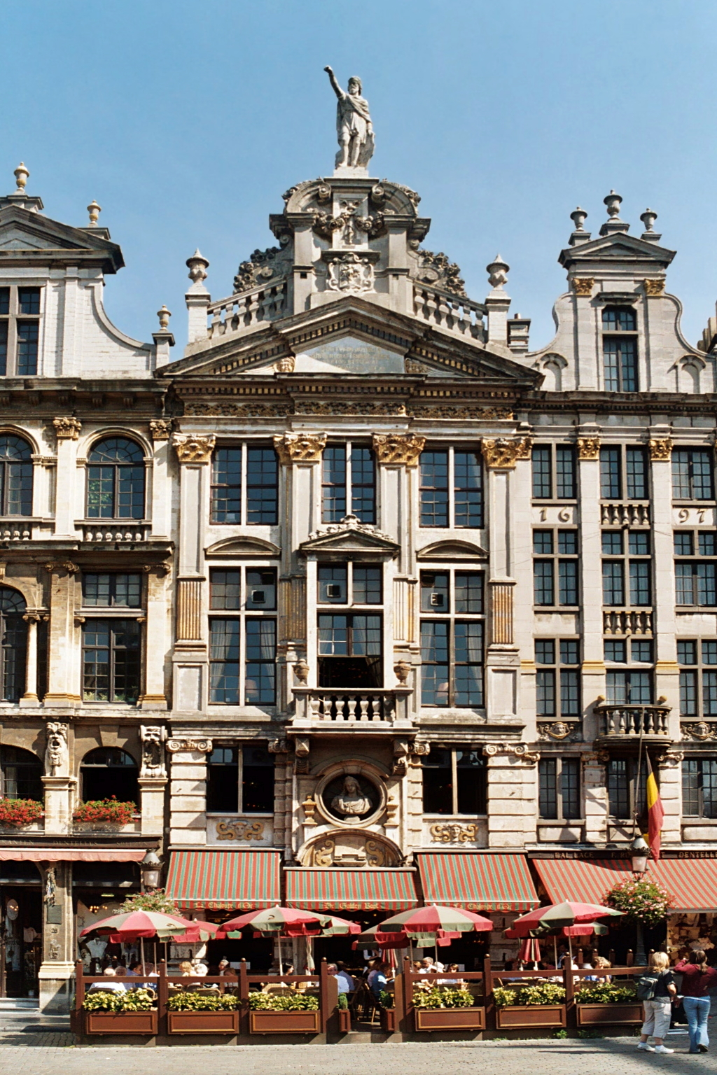 Belgique - Bruxelles - Grand-Place - Maison de la Chaloupe d'Or